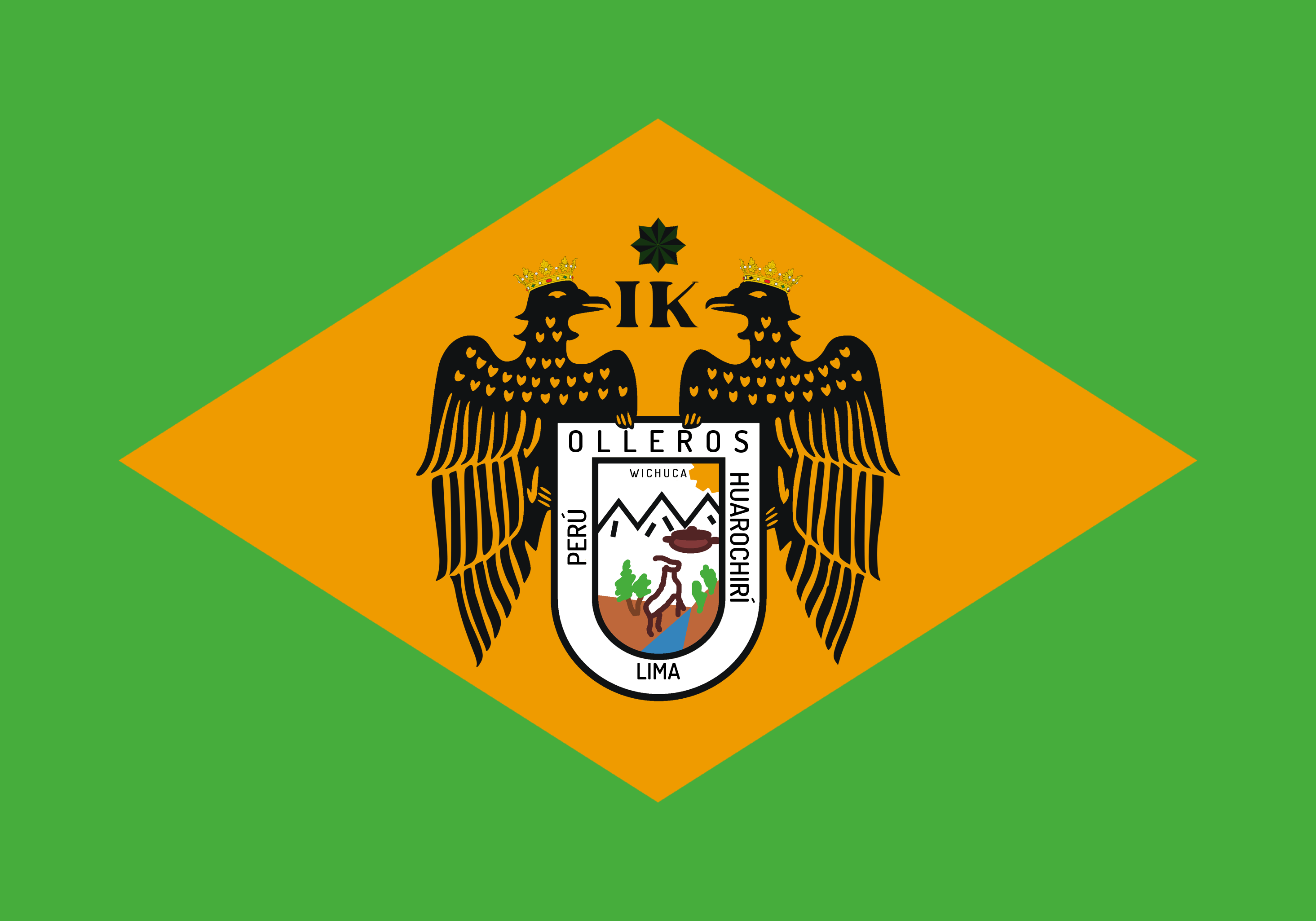 Santo Domingo de los Olleros, Huarochirí, Lima